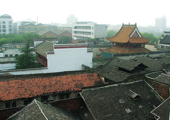 湘潭老城掠影，中间为清朝始建的北方五省湘潭会馆的关圣殿